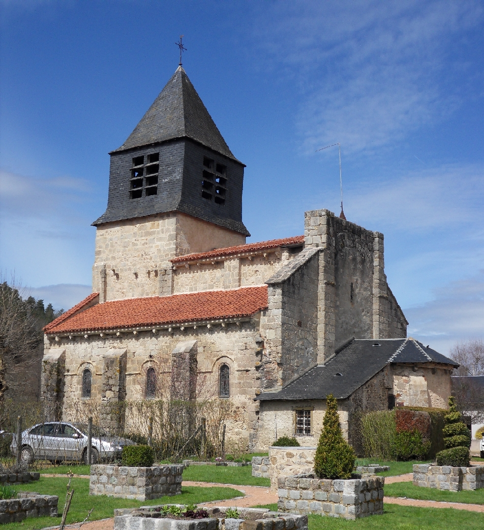 Église Saint-Léger (Inscrit) .